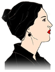 Perfil de Monic bellucci en su papel de Malena